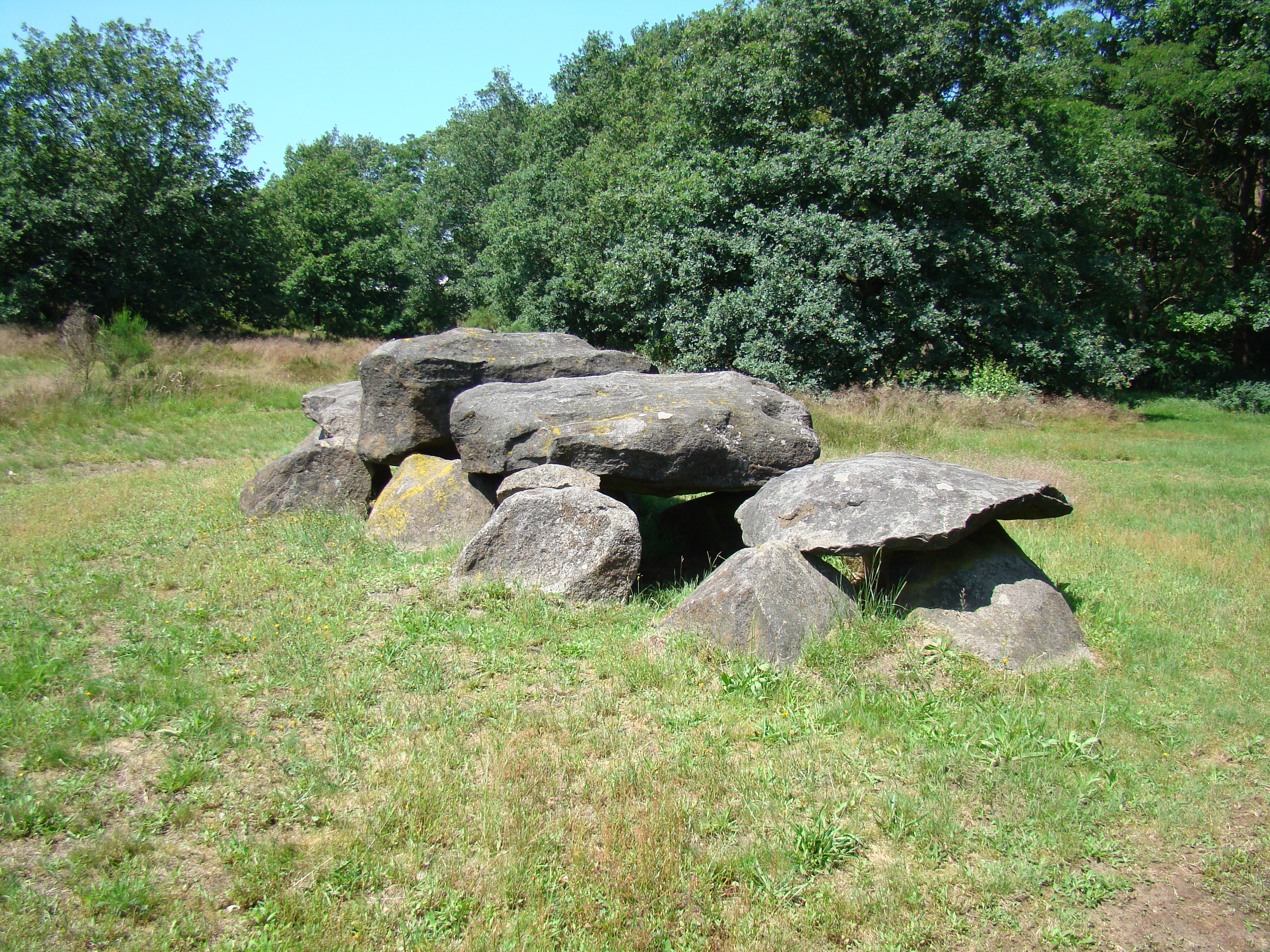 Emmen (Netherlands)